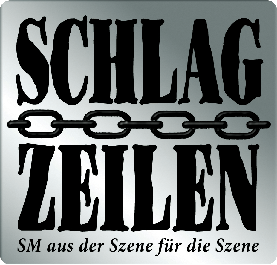 Logo des deutschsprachigen BDSM-Magazins Schlagzeilen. Urheber: Frank Behnsen und Matthias Grimme, Entwurf aus dem Jahr 2012. Schrifttype: Schlagzeilen schmalfett, entworfen von Frank Behnsen. Nutzungsrechte-Inhaber von Logo und Schrifttype: Charon-Verlag Grimme & Co. KG, Hamburg, sowie: selbst. Upload in Kooperation mit den Herausgebern.